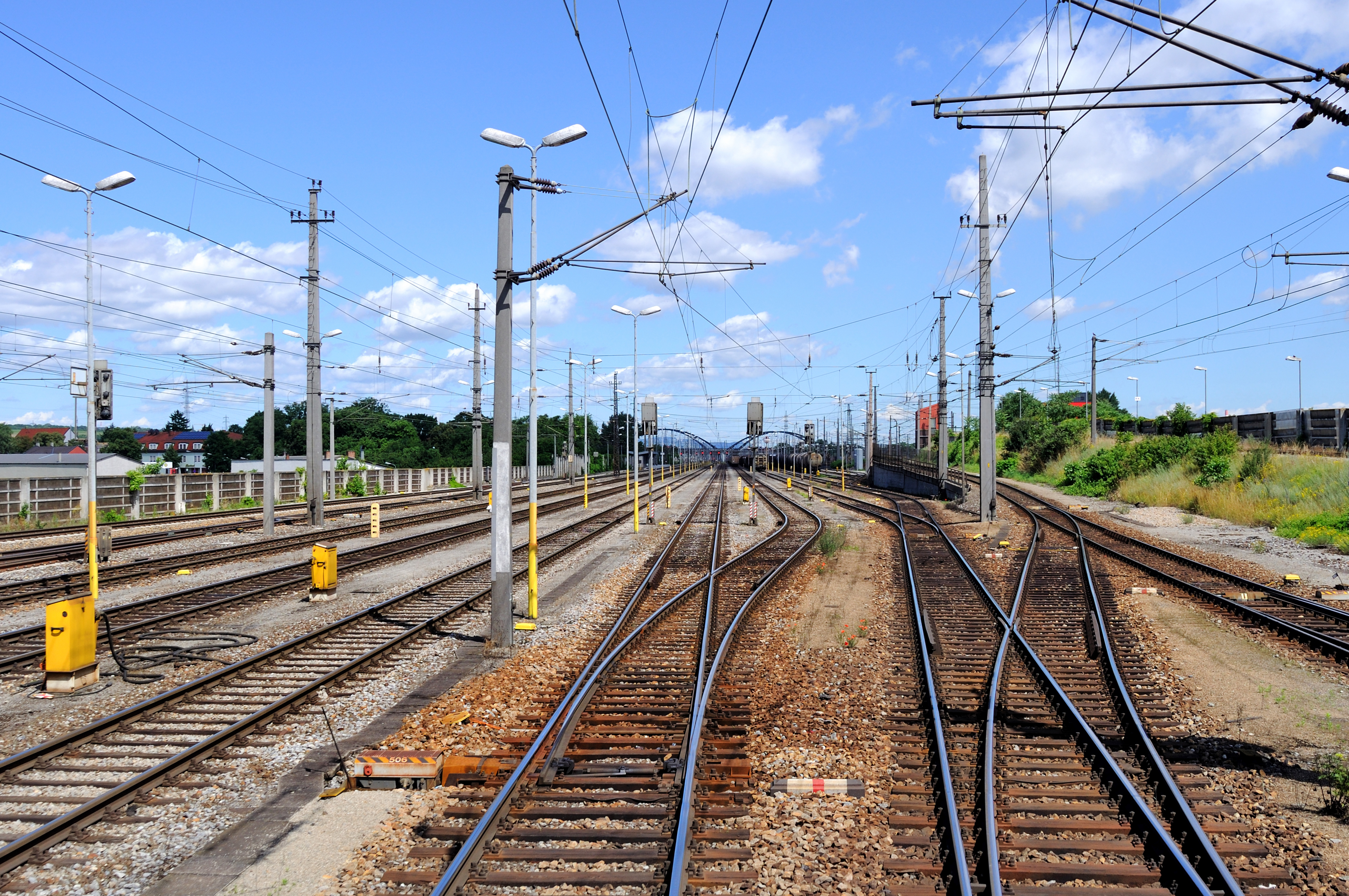 Ausfahrgruppe am Wiener Zentralverschiebebahnhof Kledering.